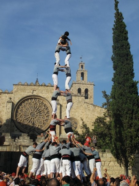 2de8 amb folre descarregat dels Castellers de Sants en el transcurs de les festes majors de Sant Cugat 2009.